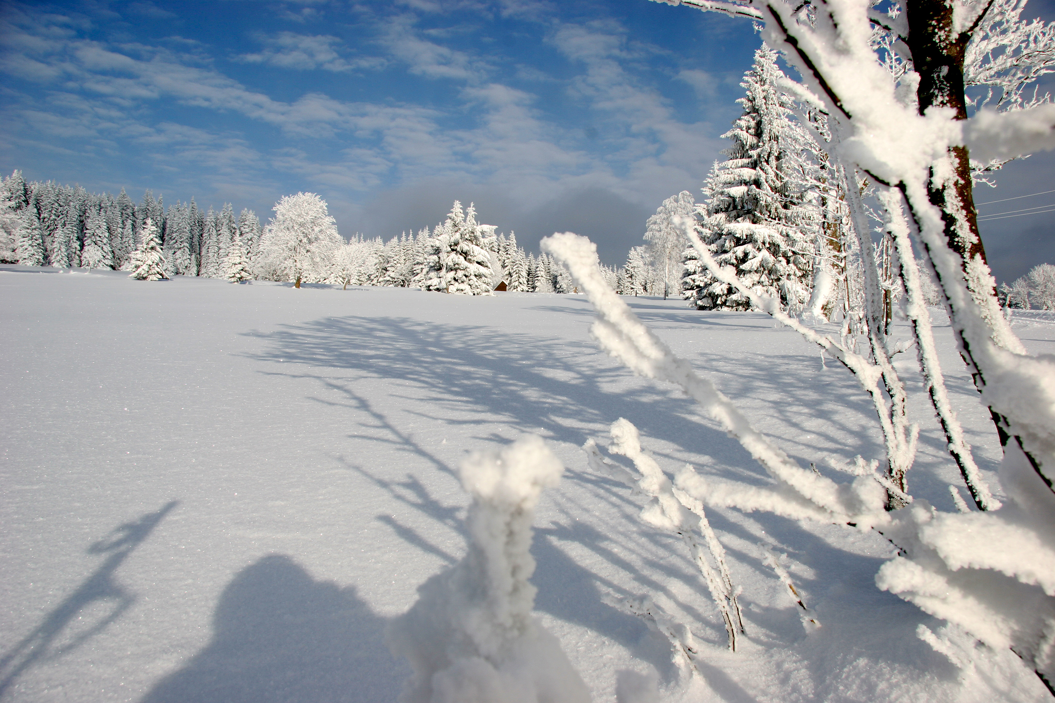 Schneebedeckter Böhmerwald am Mittag. Das bild wurde von mir, Sebastian Schreiber aufgenommen.